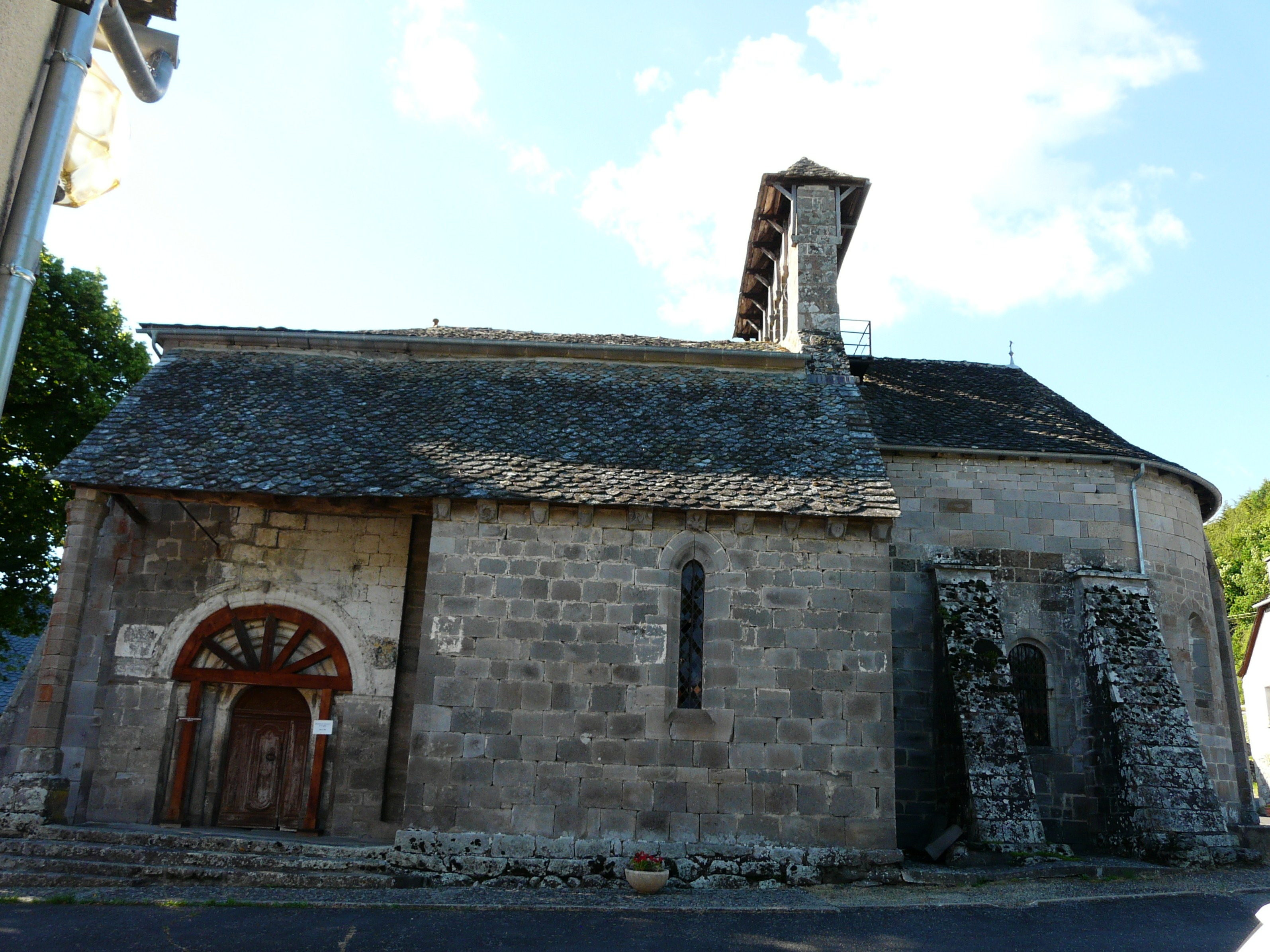 L'église de Jou-sous-Monjou, Cantal, France.